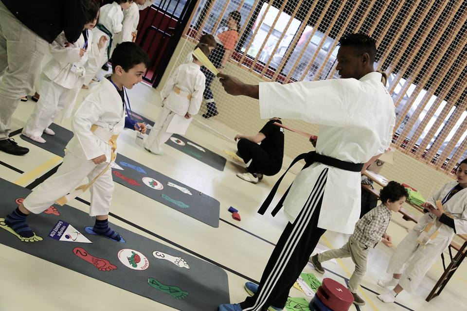 Catégorie pour enfant en situation de handicap mental